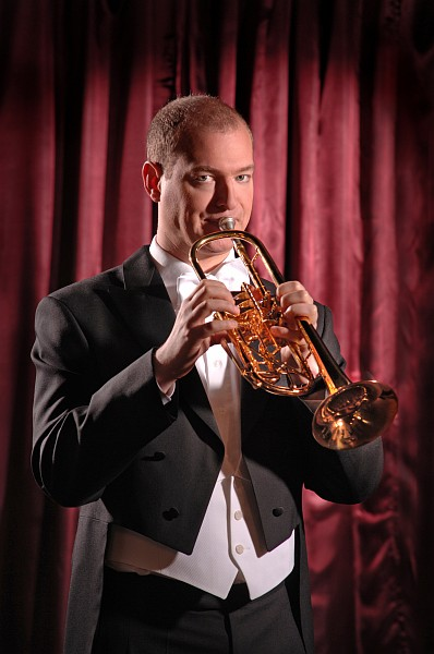 Trompeter Marc Bühler (*1976 in Bretten) im Frack mit Trompete